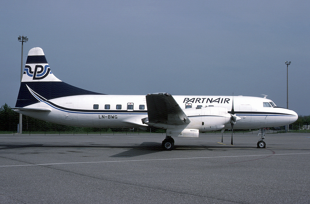 Partnair Convair 580 LN-BWG at Euroairport